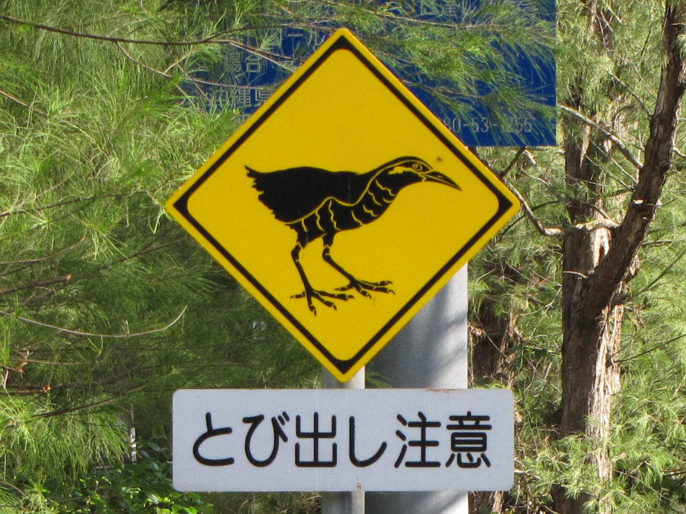 沖縄県のヤンバルクイナの道路横断の動物注意を促す道路標識。